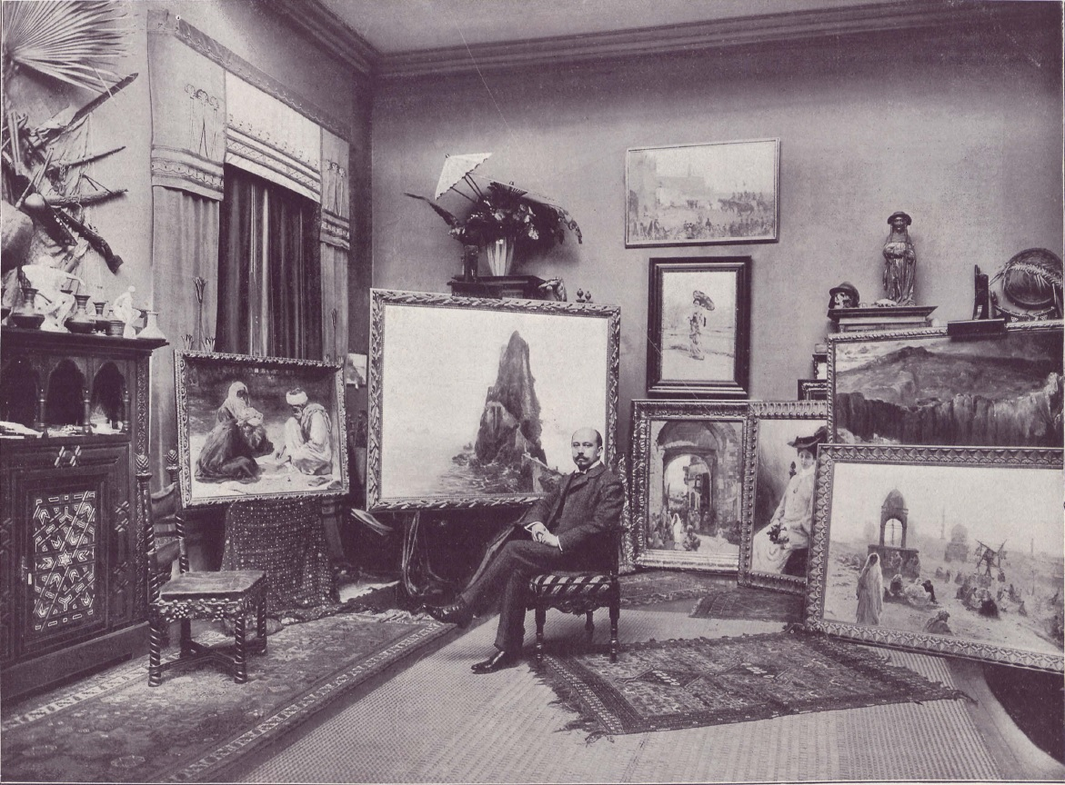 Der Berliner Orientmaler Max Rabes in seinem Atelier, 1905.